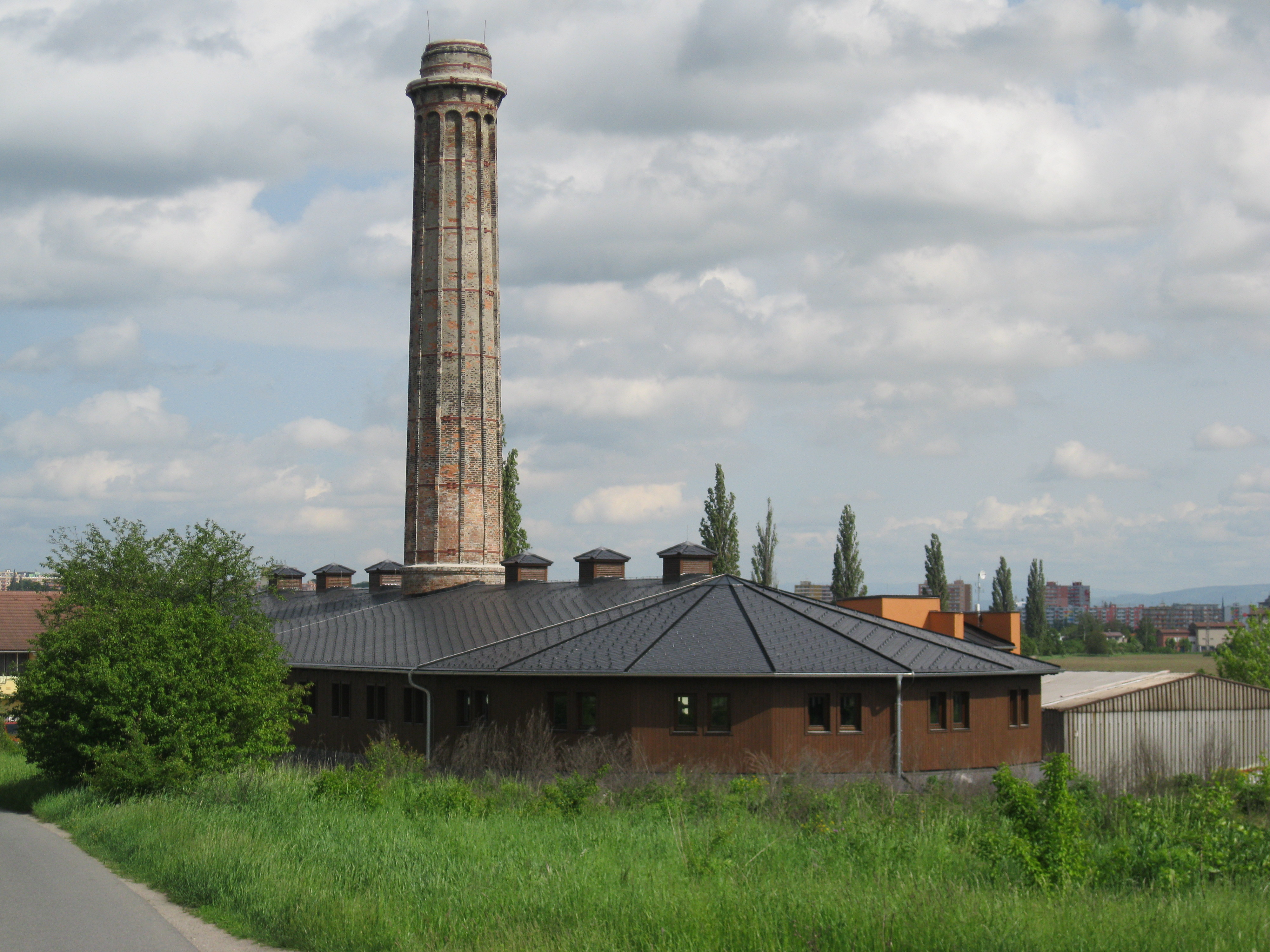 Cihelna kruhová (Olomouc), Kyselovská ul., Olomouc